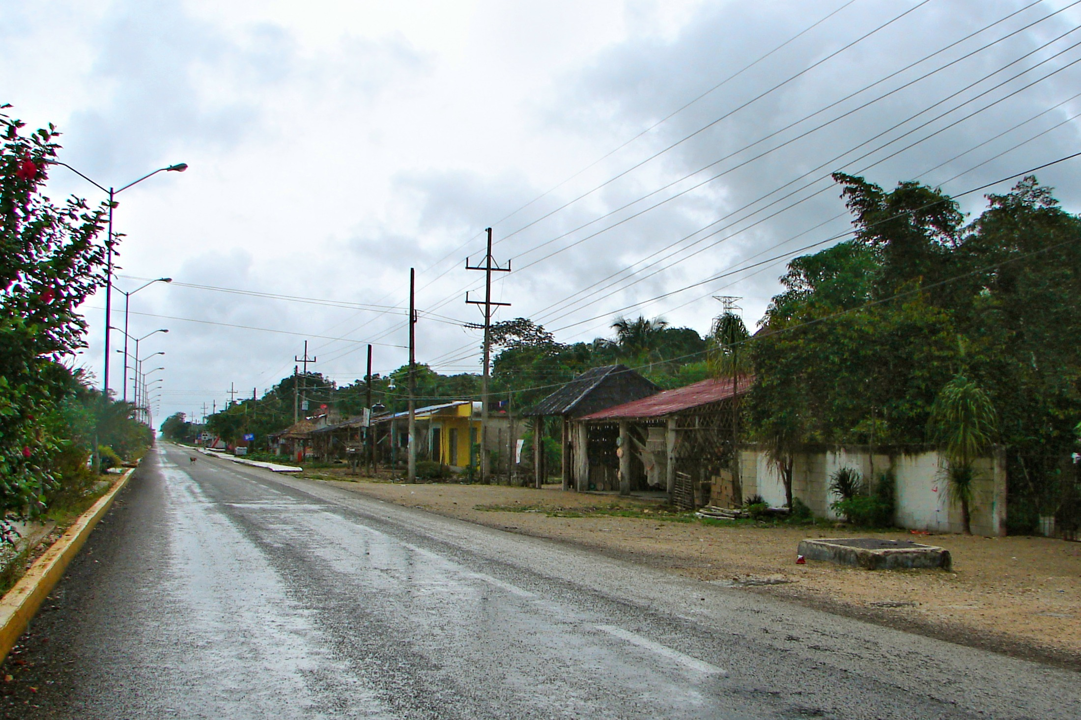 Manuel Antonio Hay (Tulum Municipality), Quintana Roo, Mexico